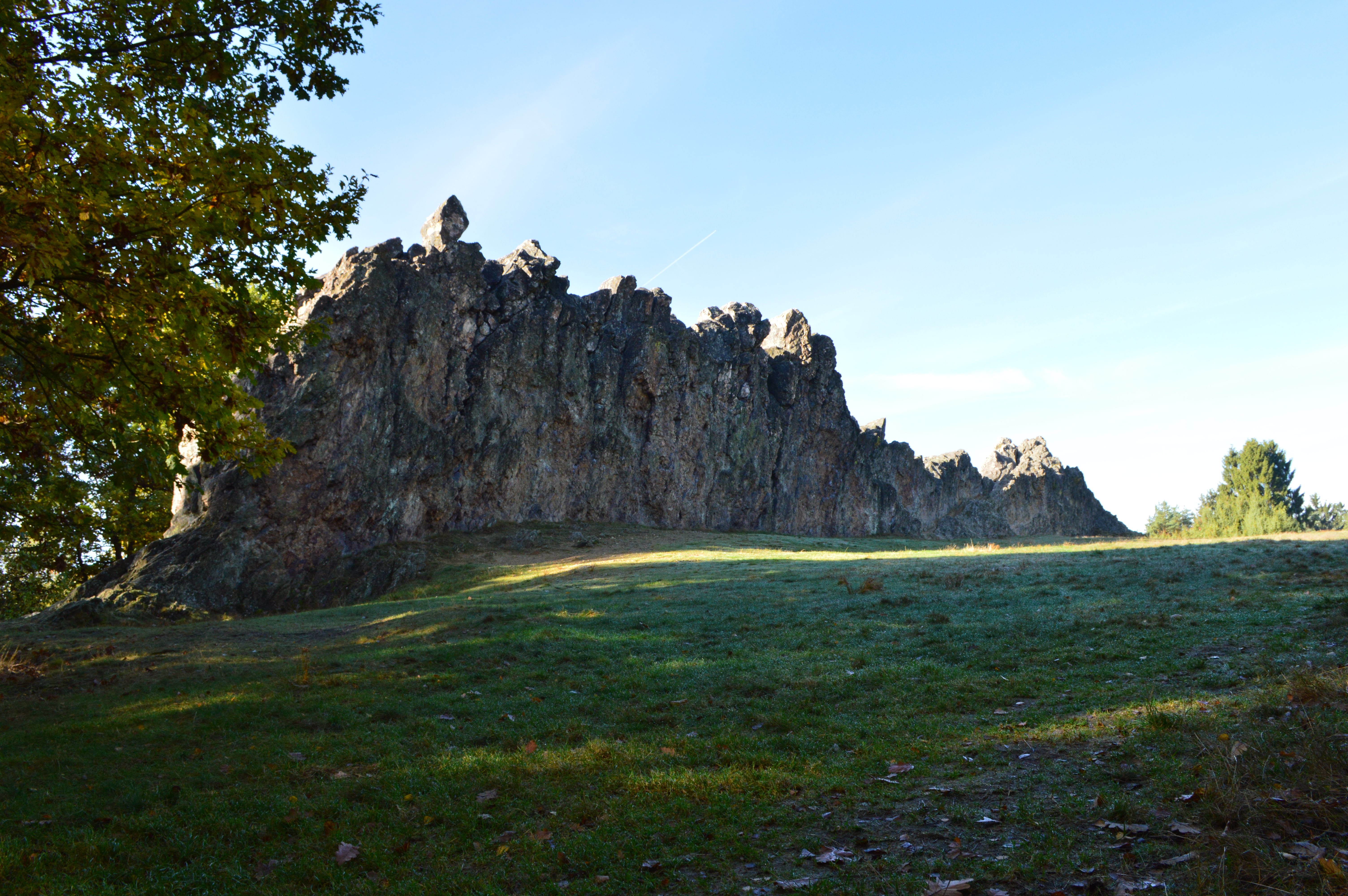 Eschbacher Klippen November 2016